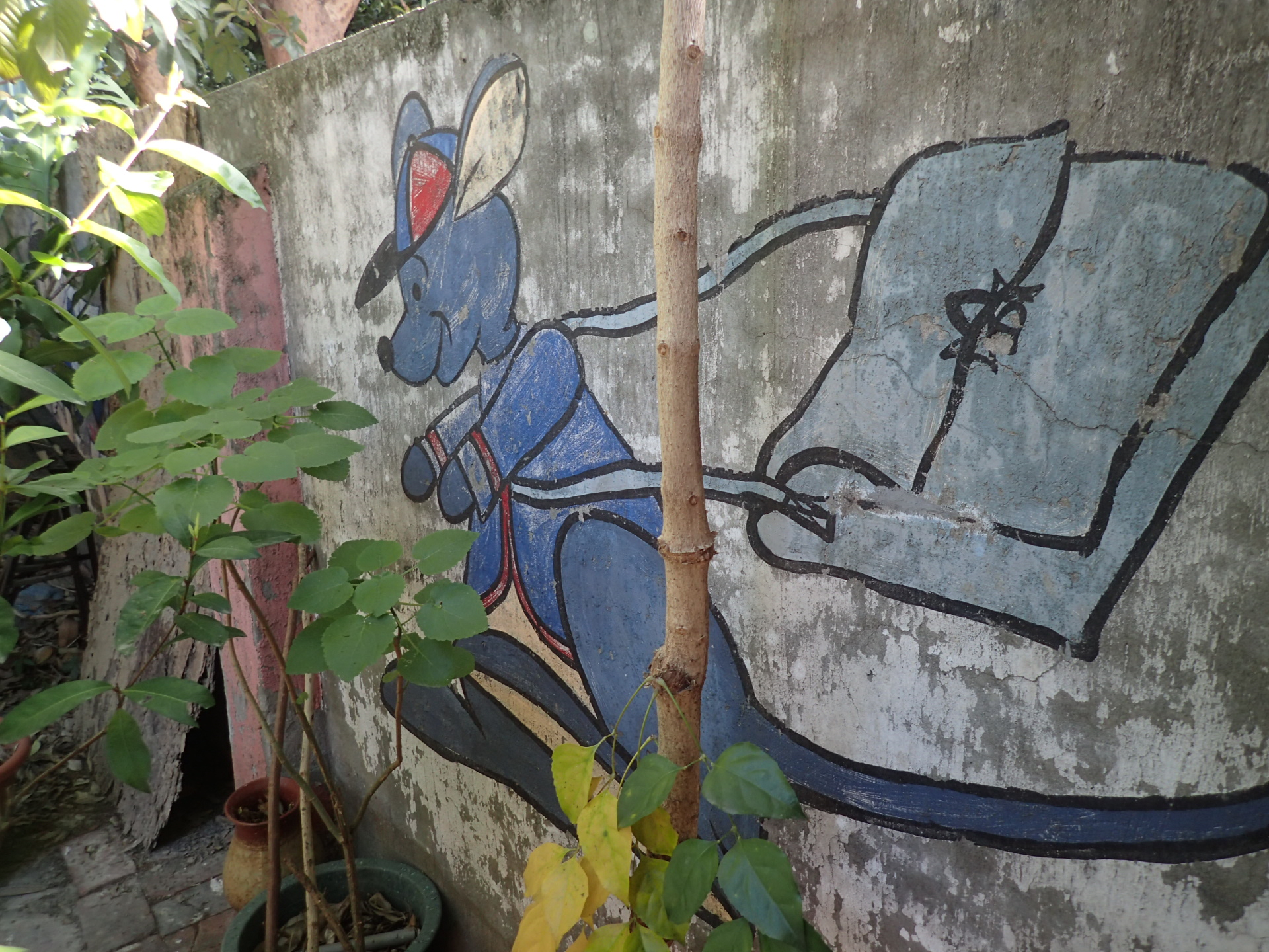 北屯文昌廟三穿門左側牆面曾經出租作幼兒園的證據。